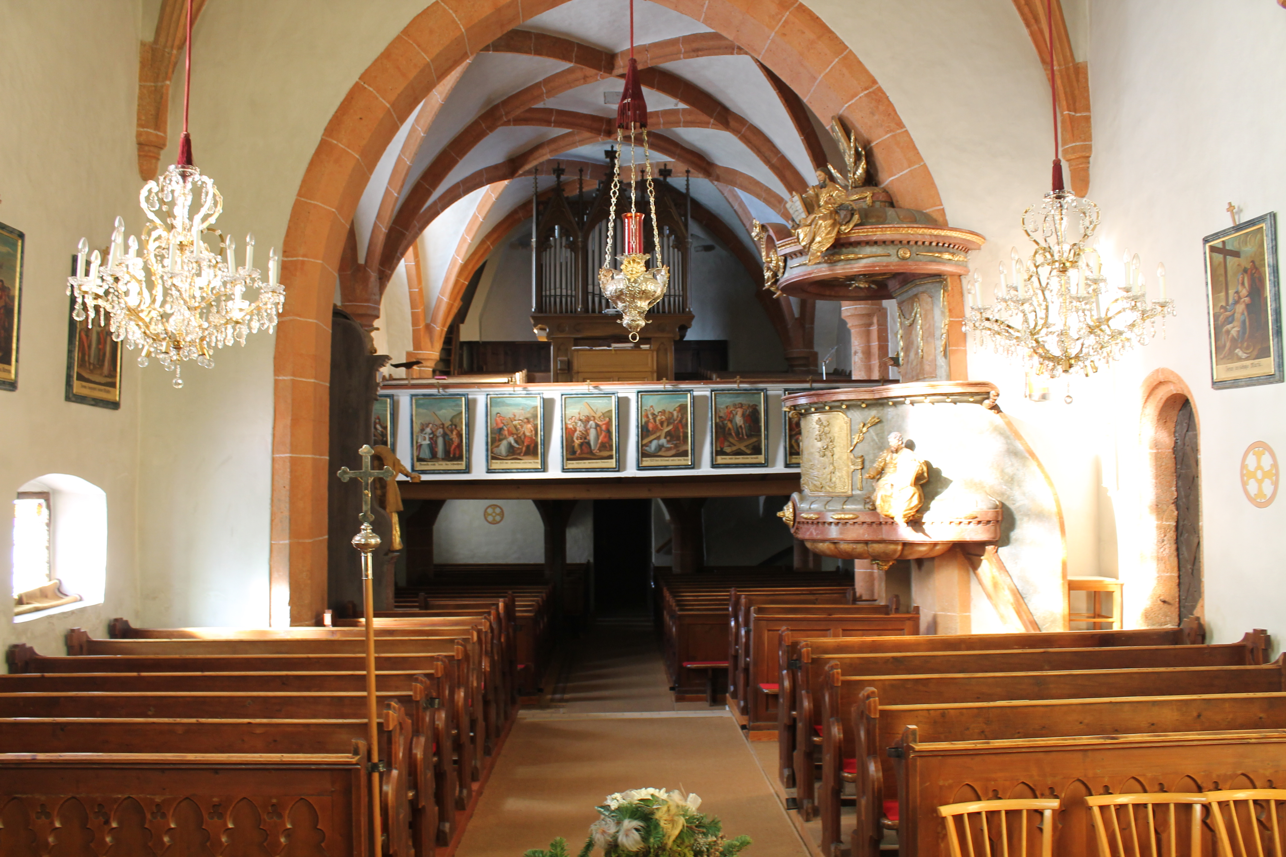 Object location47° 33′ 18.31″ N, 13° 55′ 58.15″ E